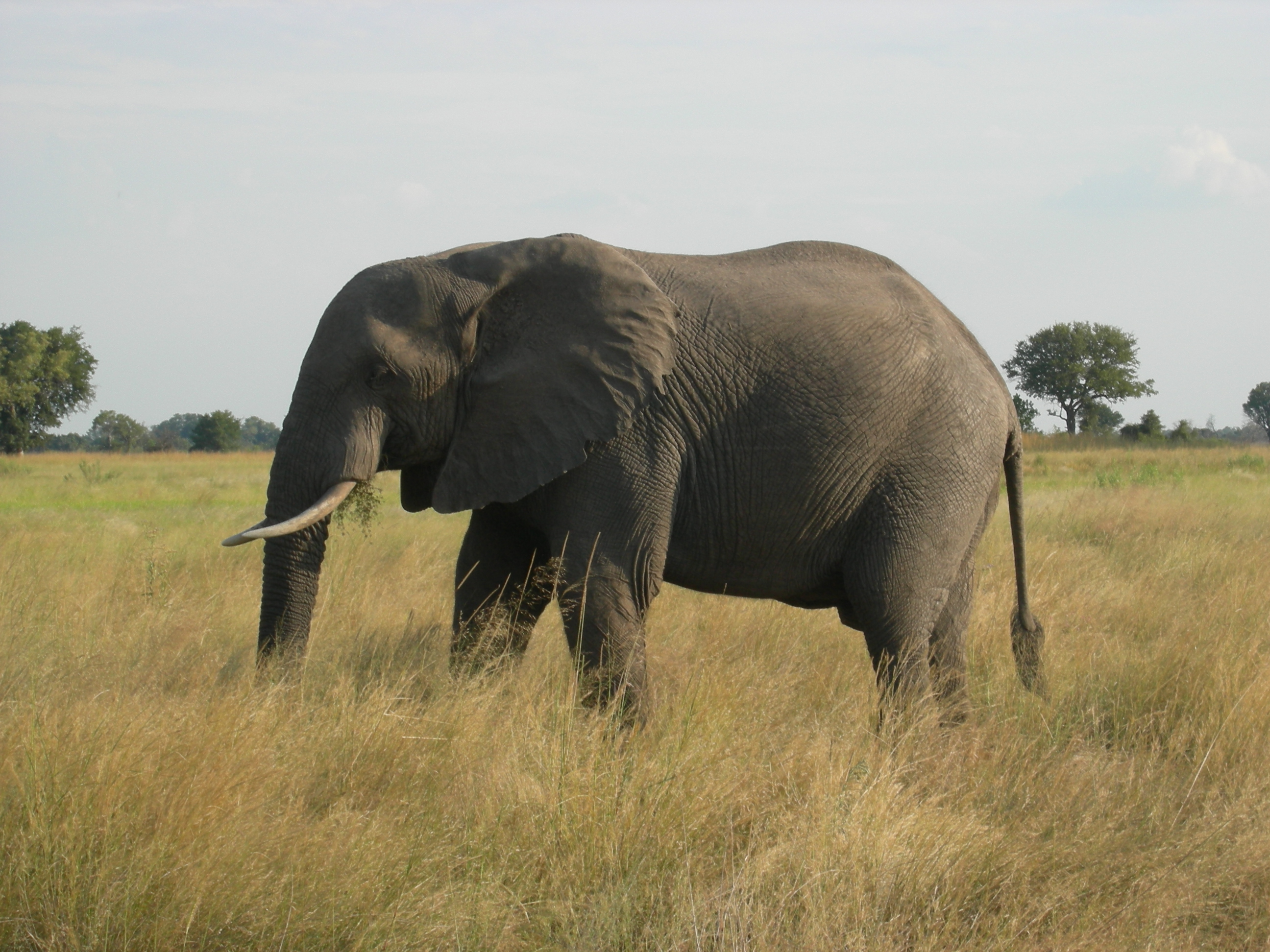 Okavango Delta, Botswana